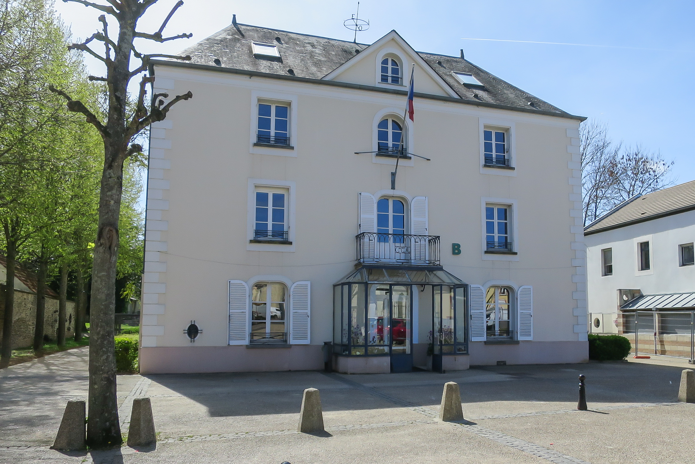 Vue de la façace avant du bâtiment B de l'hôtel de ville de Lieusaint (Hôtel de ville historique) / Seine-et-Marne / France